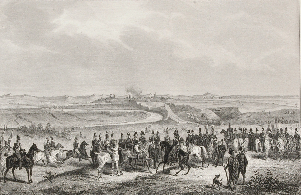 Toma de Pamplona en septiembre de 1823. Ilutración de Melchior Peronard.